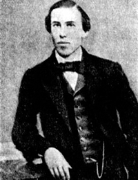 Nikolaj A. Serno-Solv'evic (1834-1866)